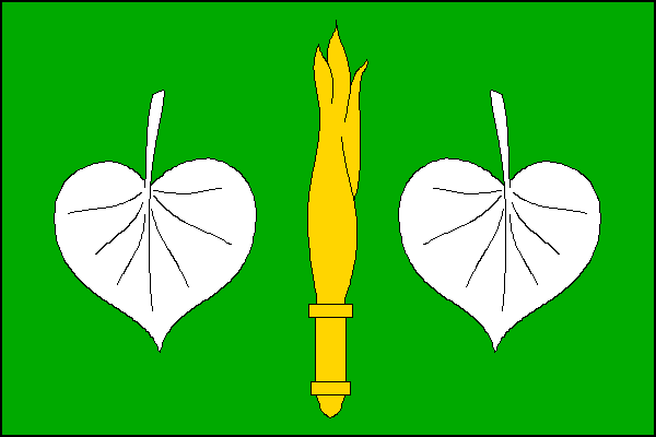 vlajka, Písečné, okres Žďár nad Sázavou